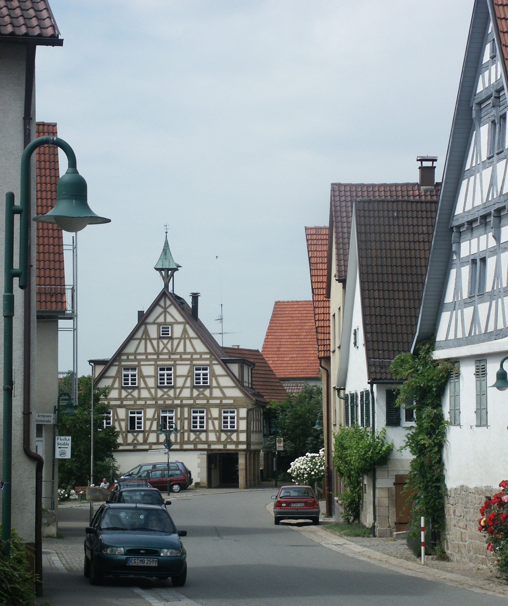 Schlaitdorf, Mainstreet